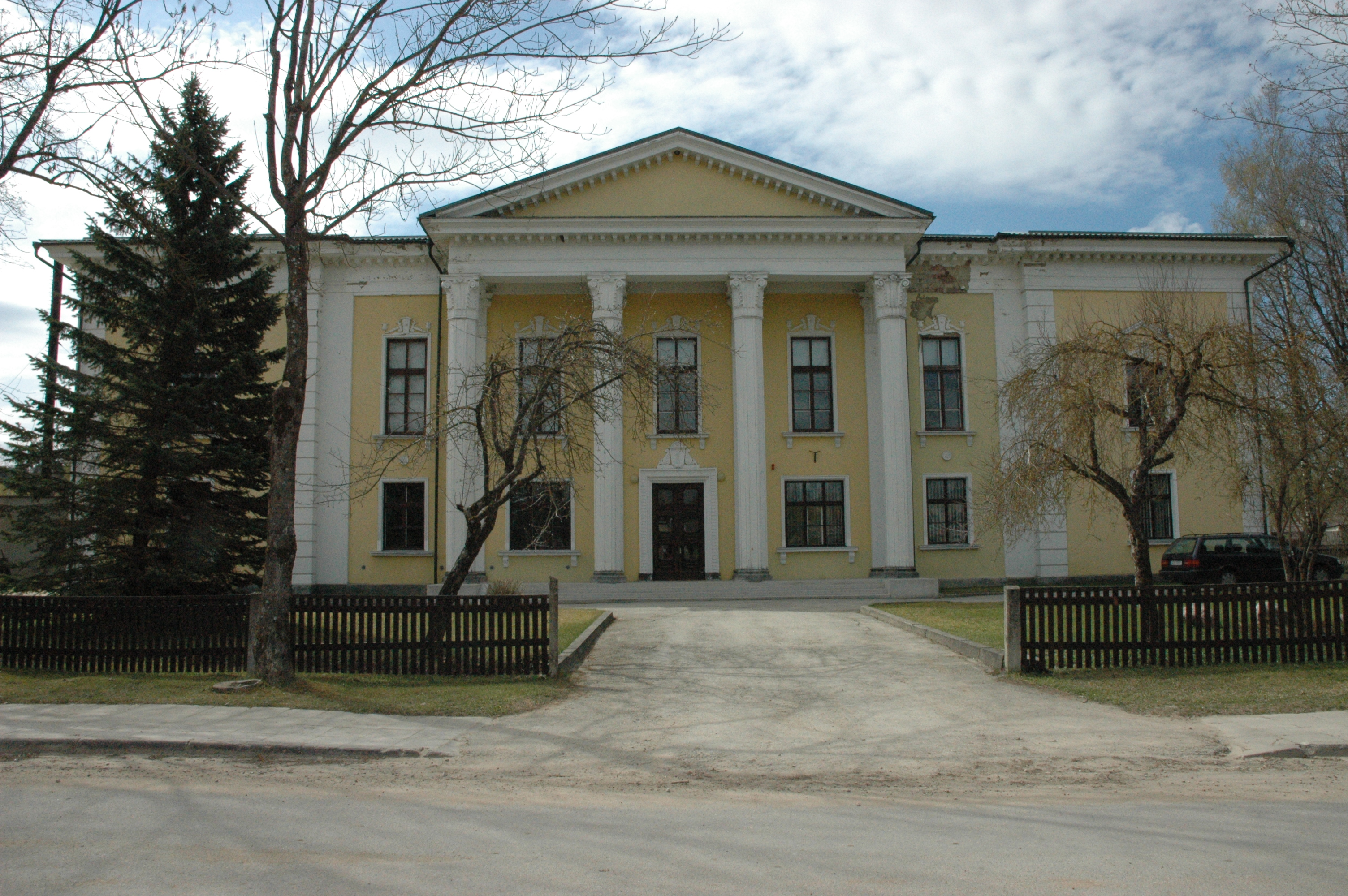 Vastseliina Rahvamaja